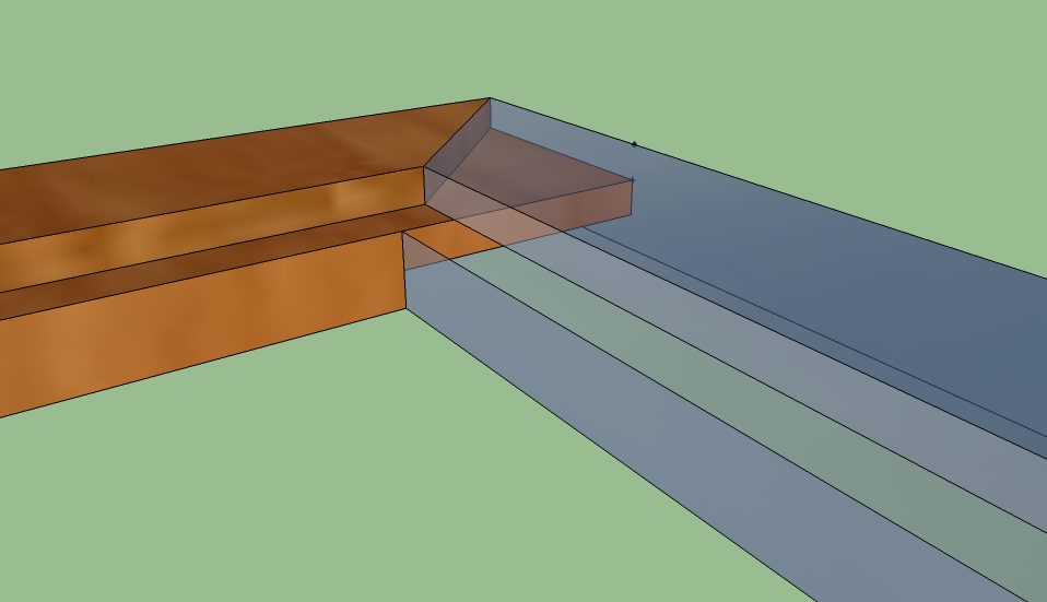 45 fokos ollós csap aljazással